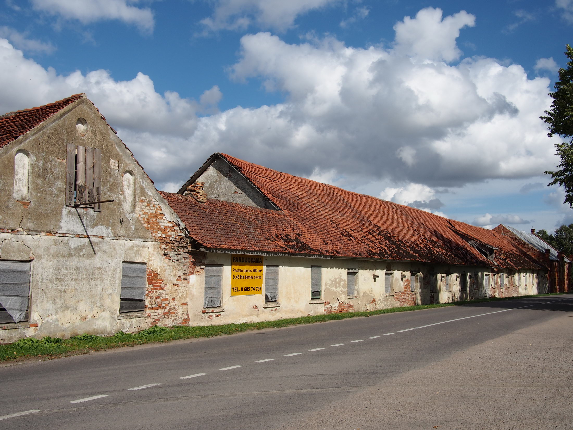 Kidulių dvaro arklininko namas ir tvartas